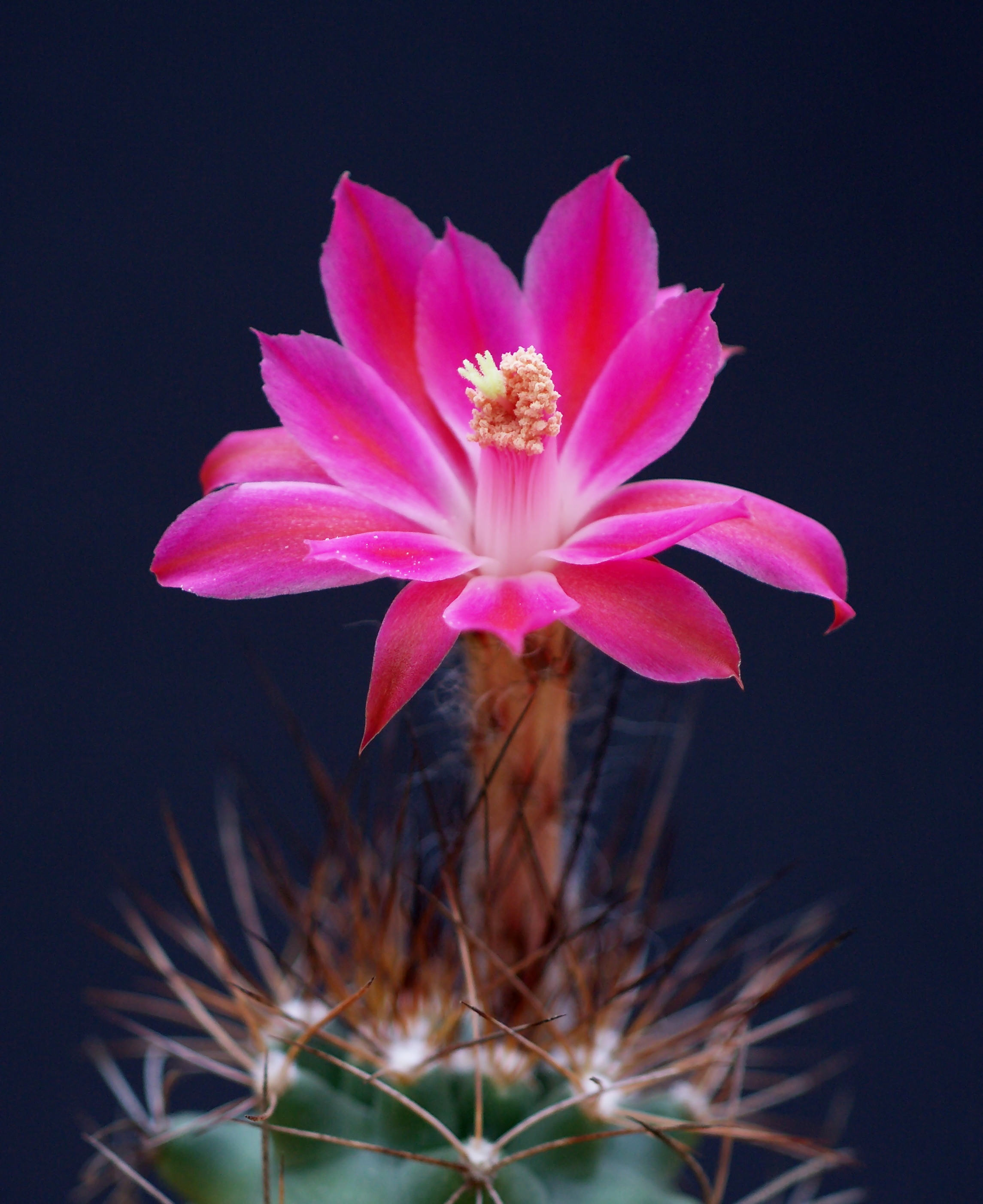 Aufnahme mit Canon Macro Lens FD 100mm 1:4 (Adapter FD-EOS ohne Ausgleichslinse)